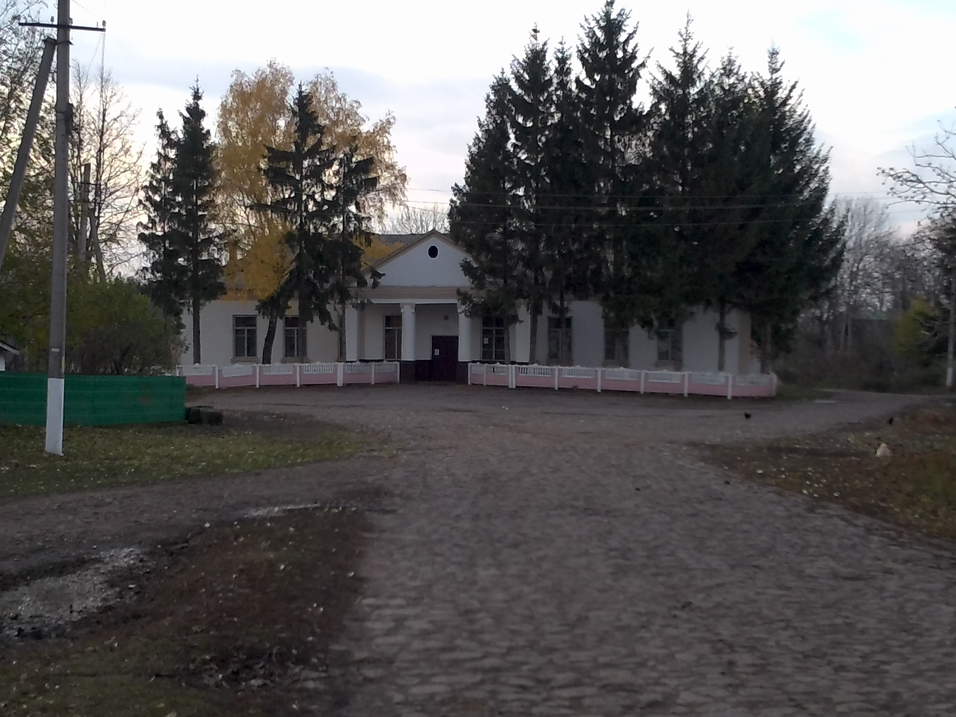 с. Вербівка. Будинок культури